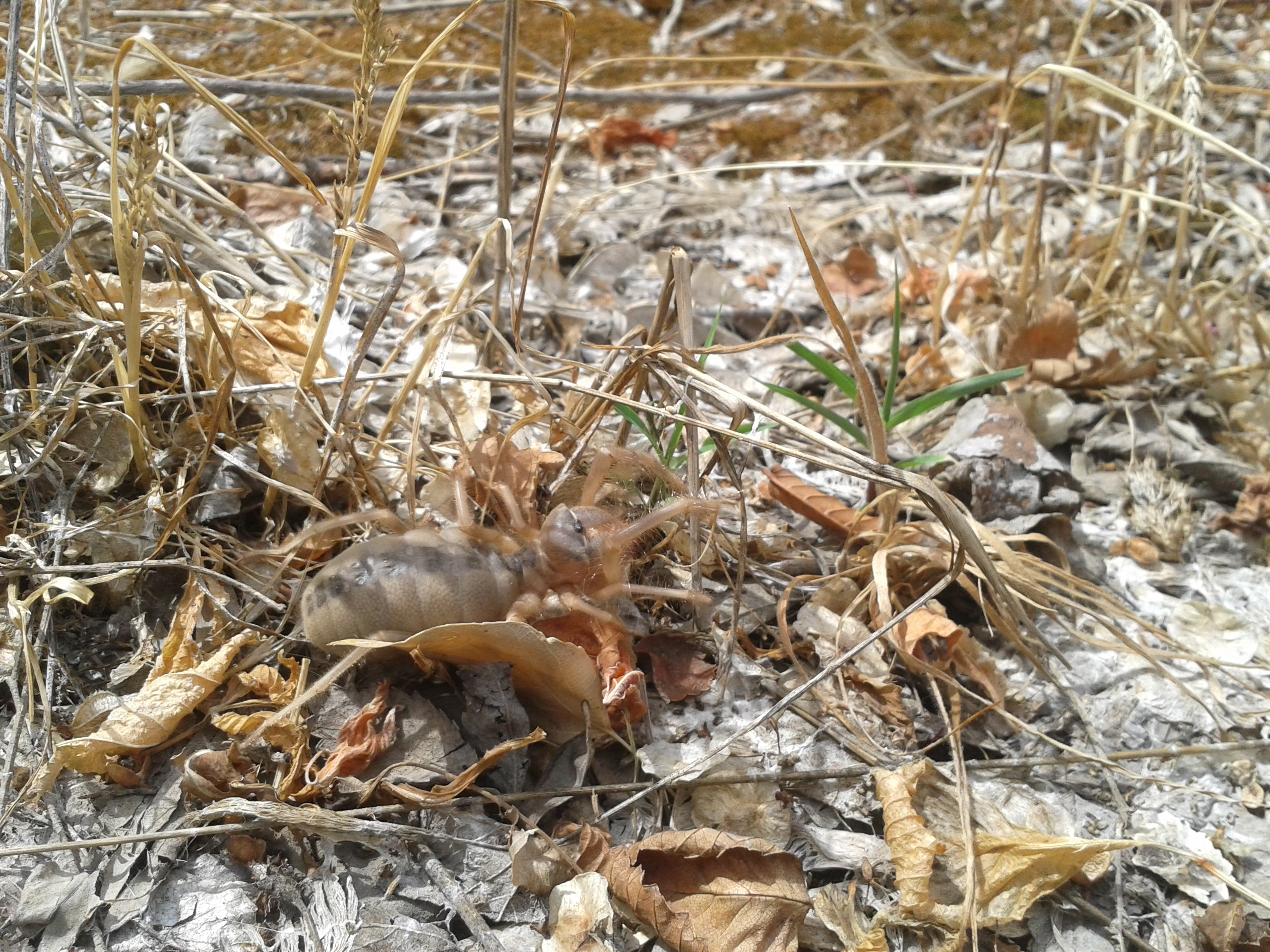 Сольпуга обыкновенная, 5 июля 2014 года